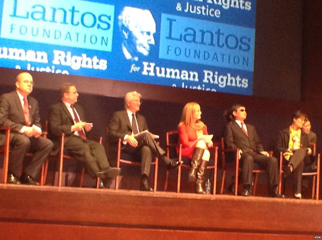 陈光诚（前排右二）在颁奖典礼上(美国之音杨晨拍摄)